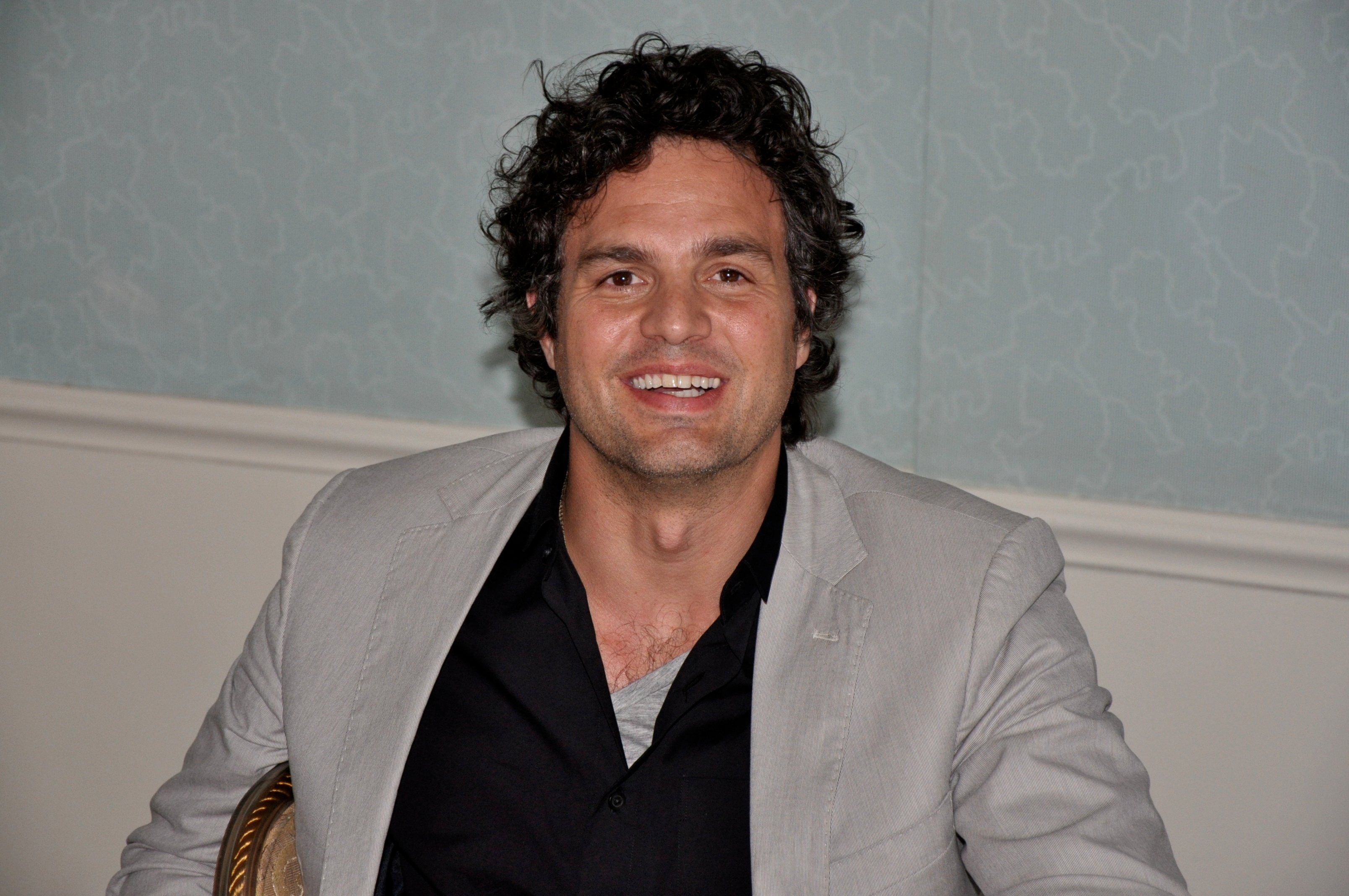 El actor Mark Ruffalo en el Festival de Cine de Nueva York 2010.